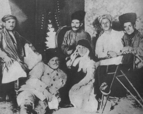 1920. В госпитале. Раненный Махно - второй слева вверху, Старобельск